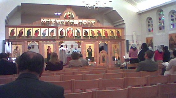 Sint Jan Guldenmondskerk, Etterbeek.